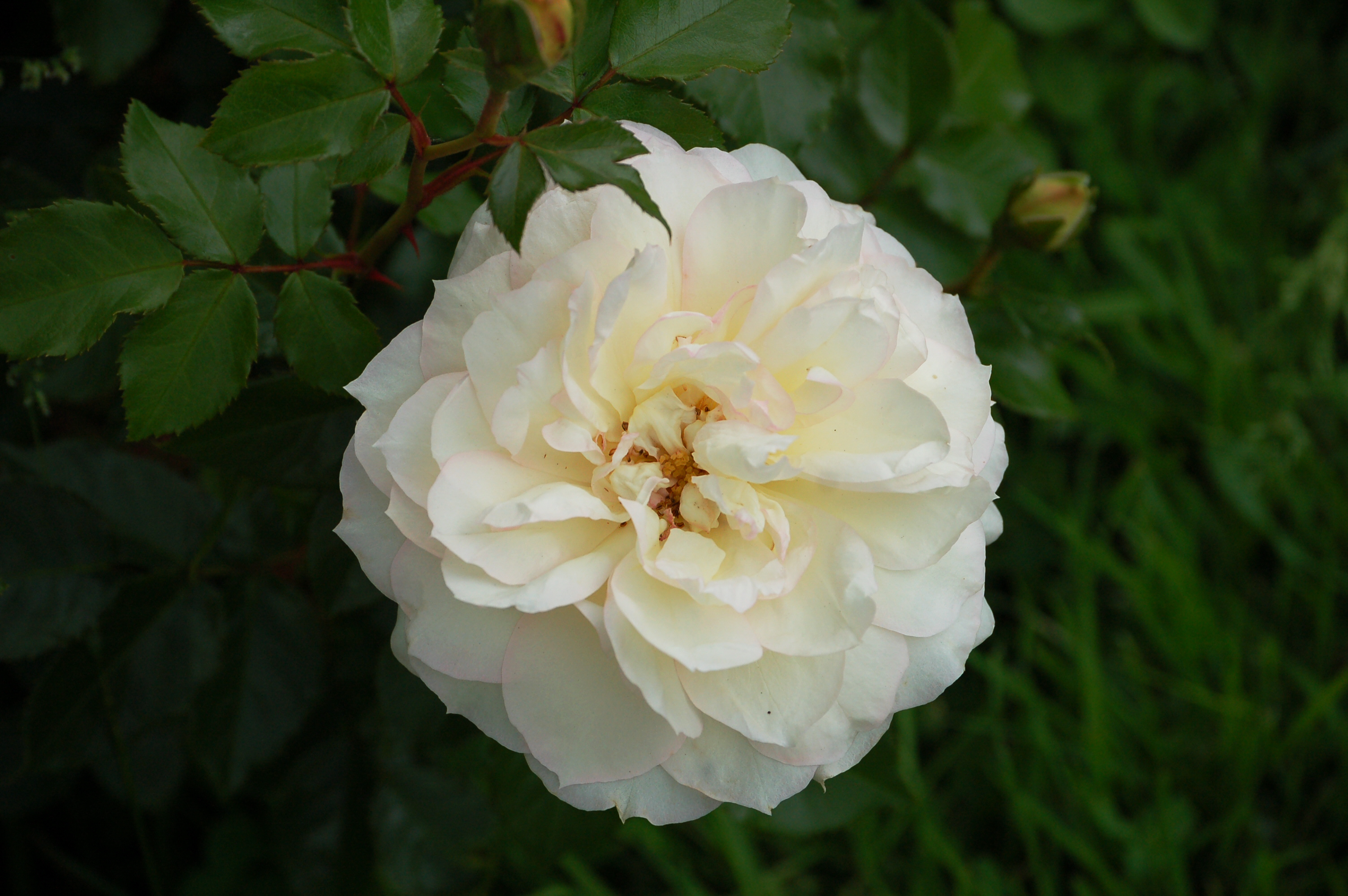 Rosa 'Tchaikovsky'